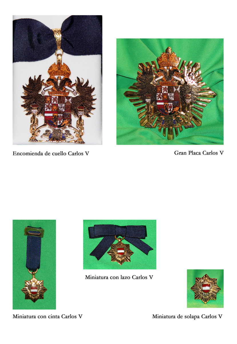 Placa